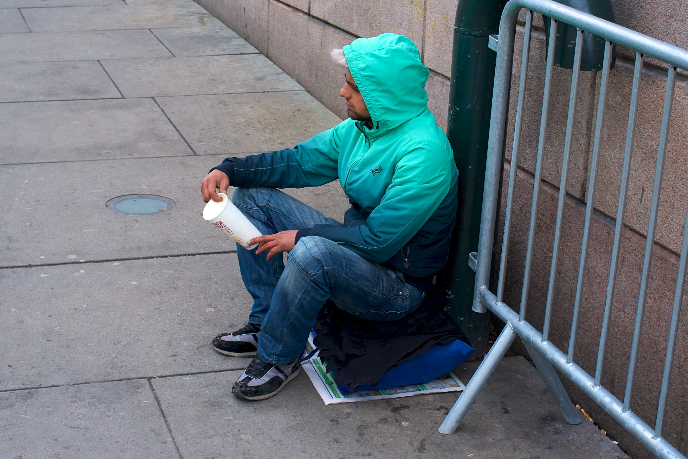 Tigger i Oslo sentrum